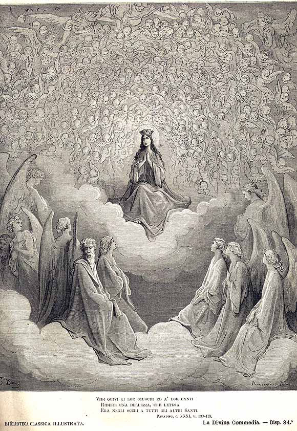 Paradiso by Dante Alighieri Illustration